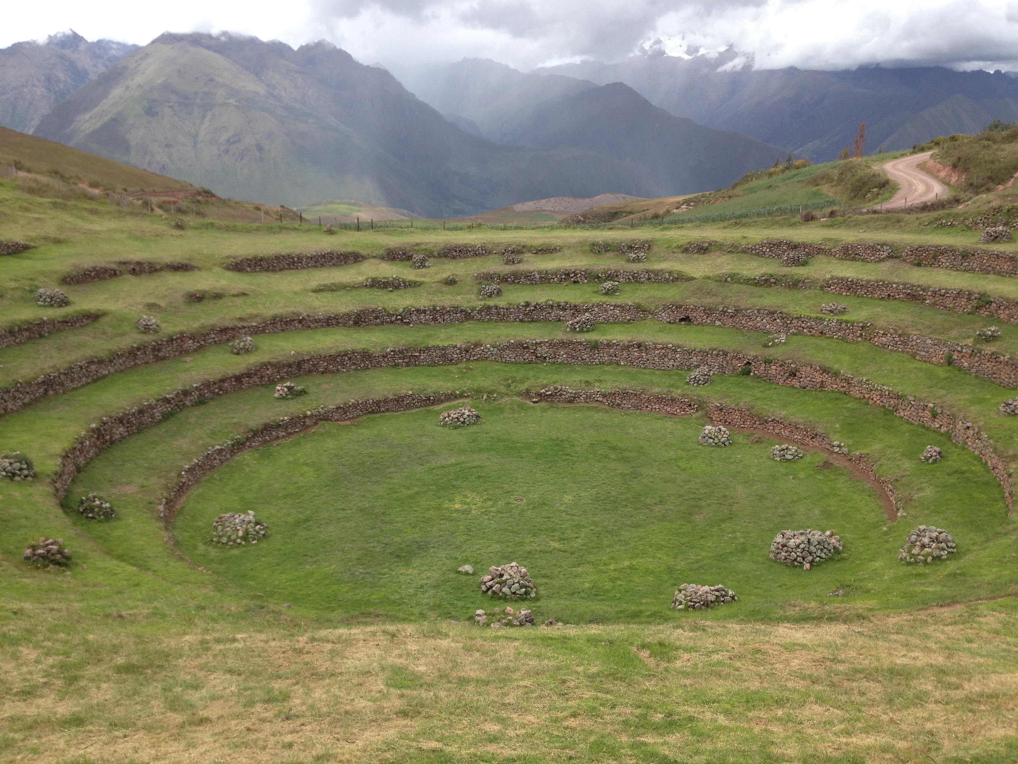 Restos arqueológicos Incas en Moray, Perú.